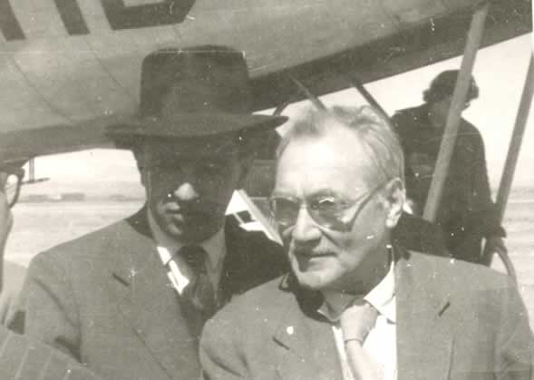 Jorge Ruiz, cineasta boliviano junto a John Grierson en 1955